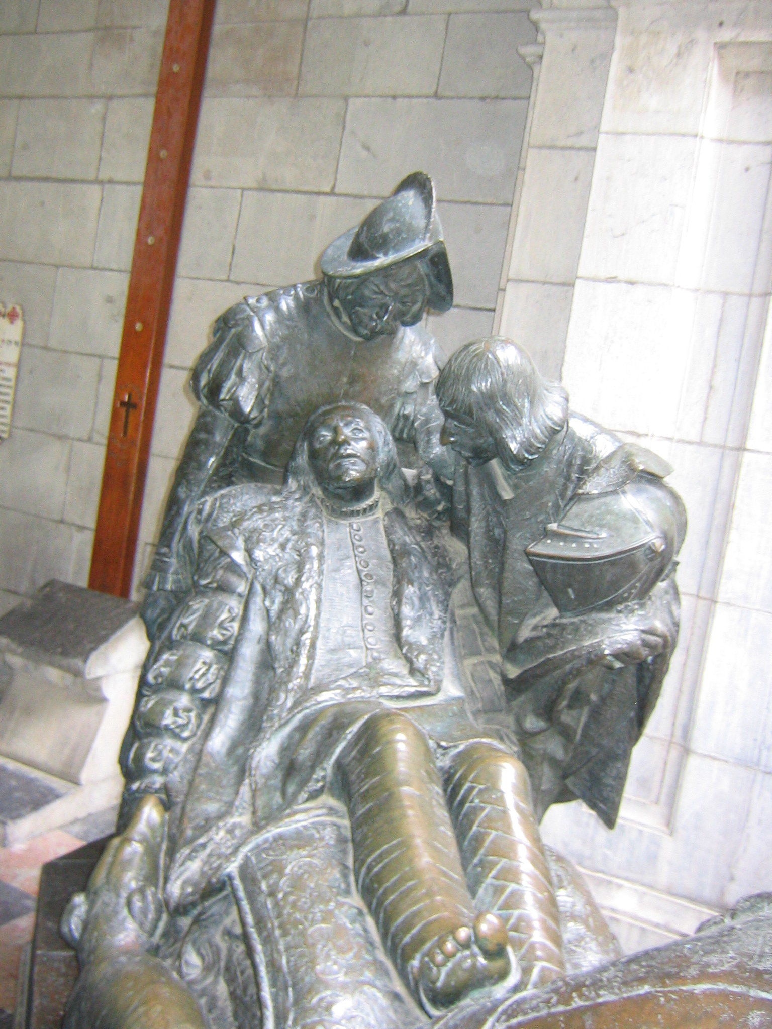 Estatua en bronce de San Igancio situada en la entrada de la Casa Santa. Santuario de Loiola, Azpeitia. Guipúzcoa, País Vasco (España).